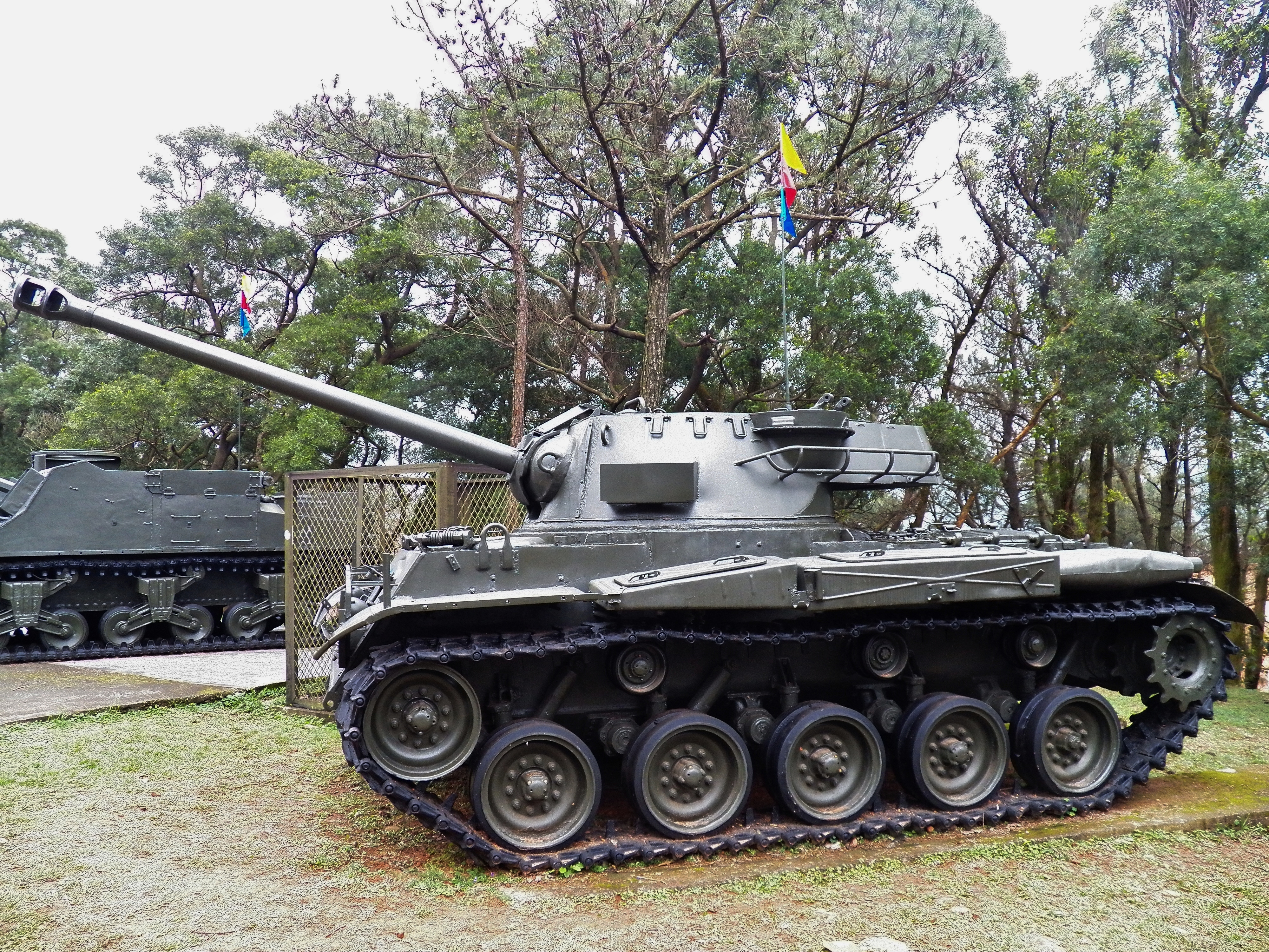 裝甲兵學校戰車公園展示的六四式輕戰車左側面。